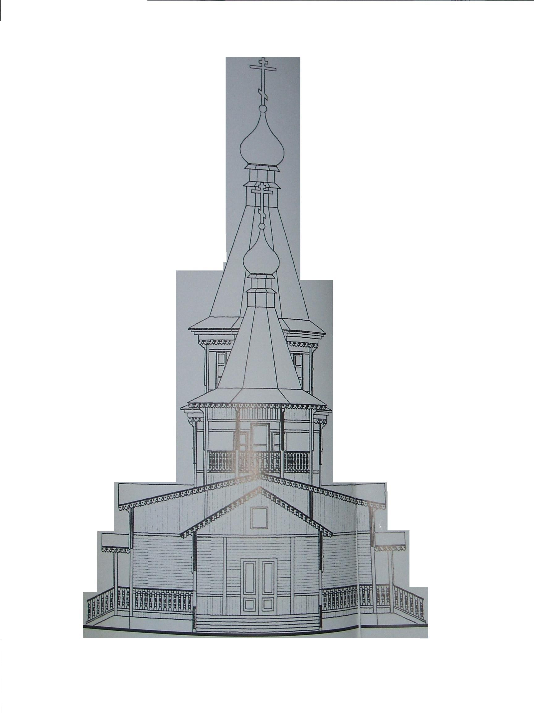 проект общего вида Тарховской церкви в 1906 году